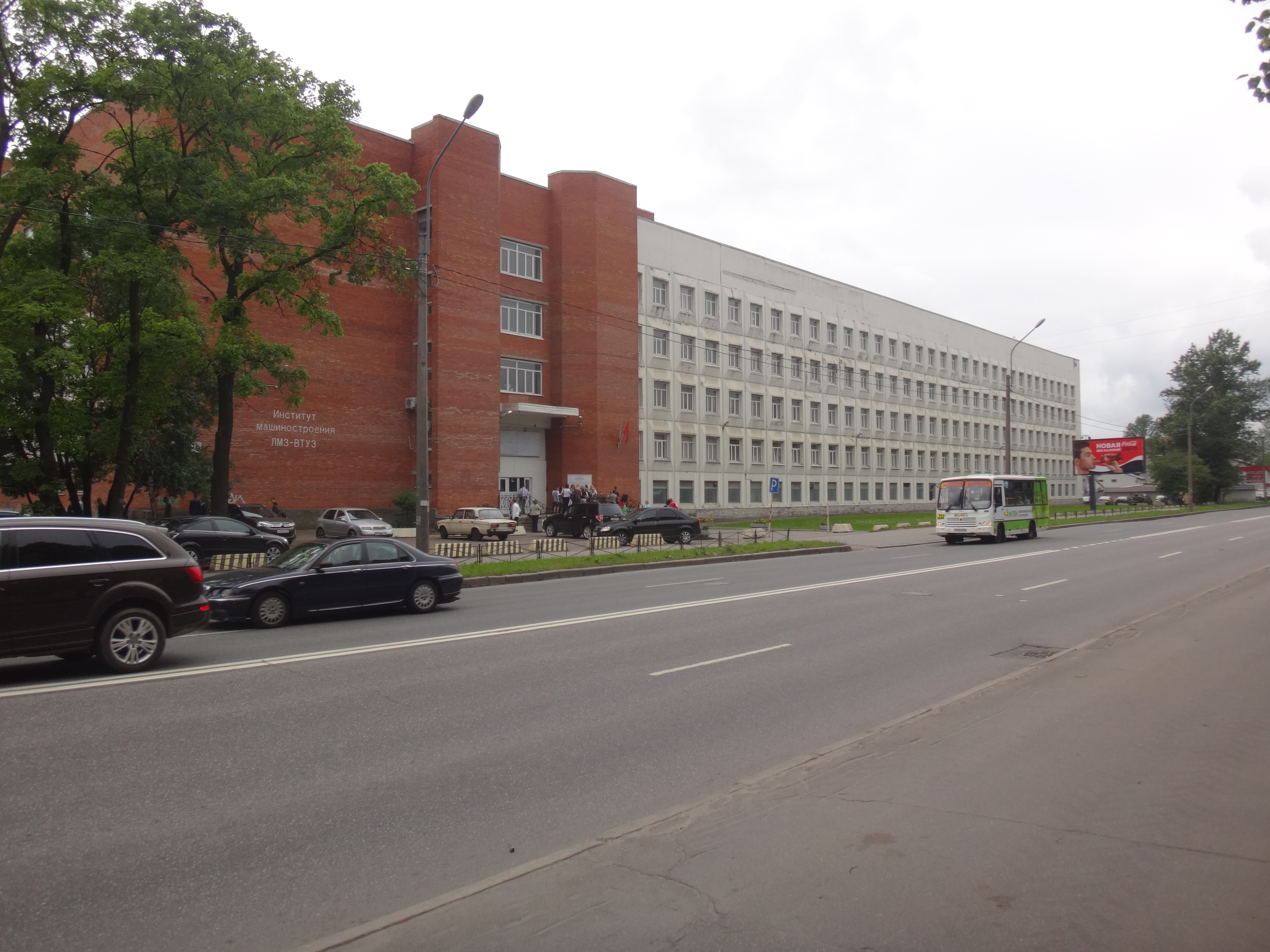 ВТУЗ-ЛМЗ (главный корпус)